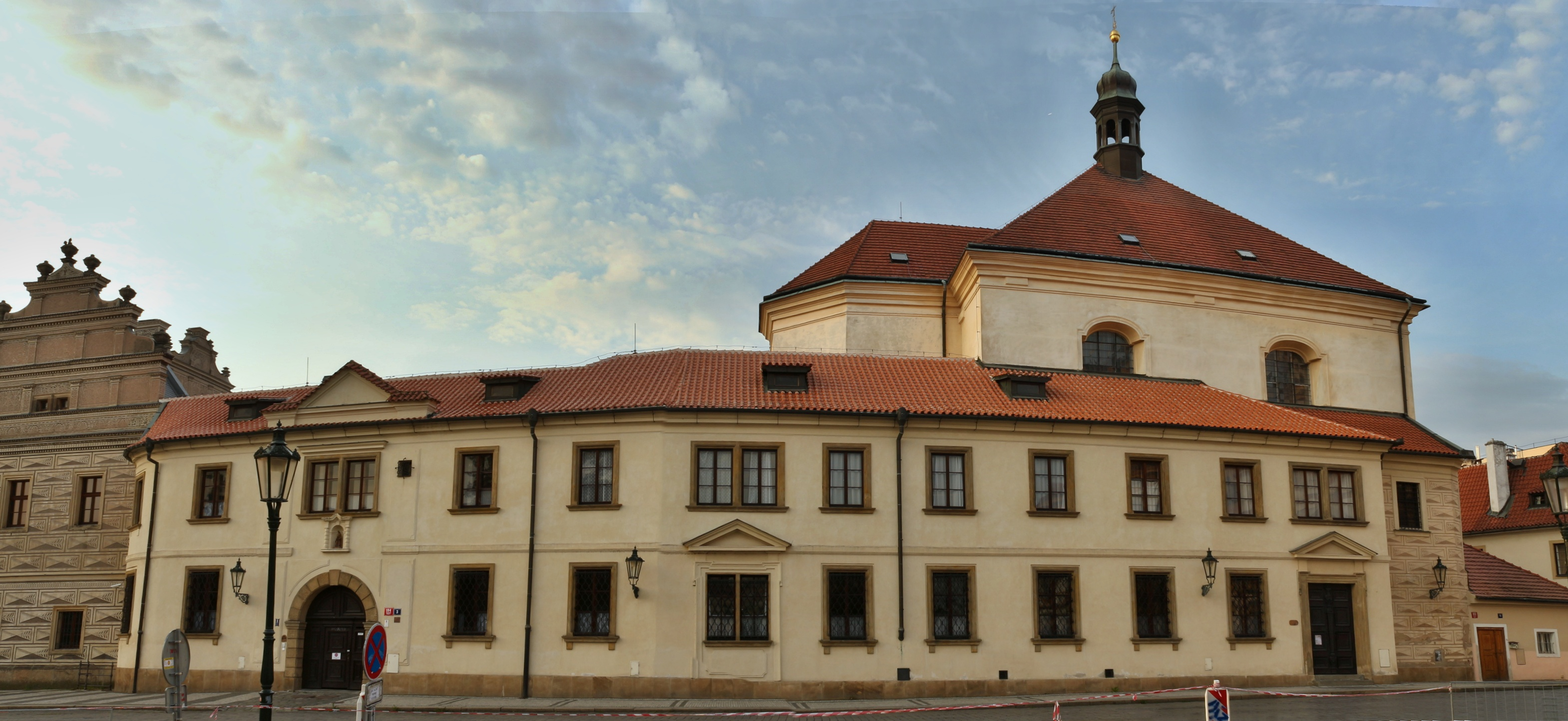 Klášter bosých karmelitánek s kostelem sv. Benedikta na Hradčanech v Praze